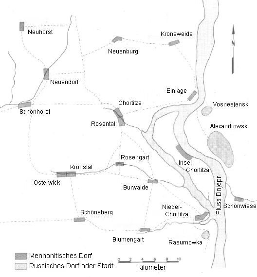 Skizze der mennonitischen Siedlung Chortitza